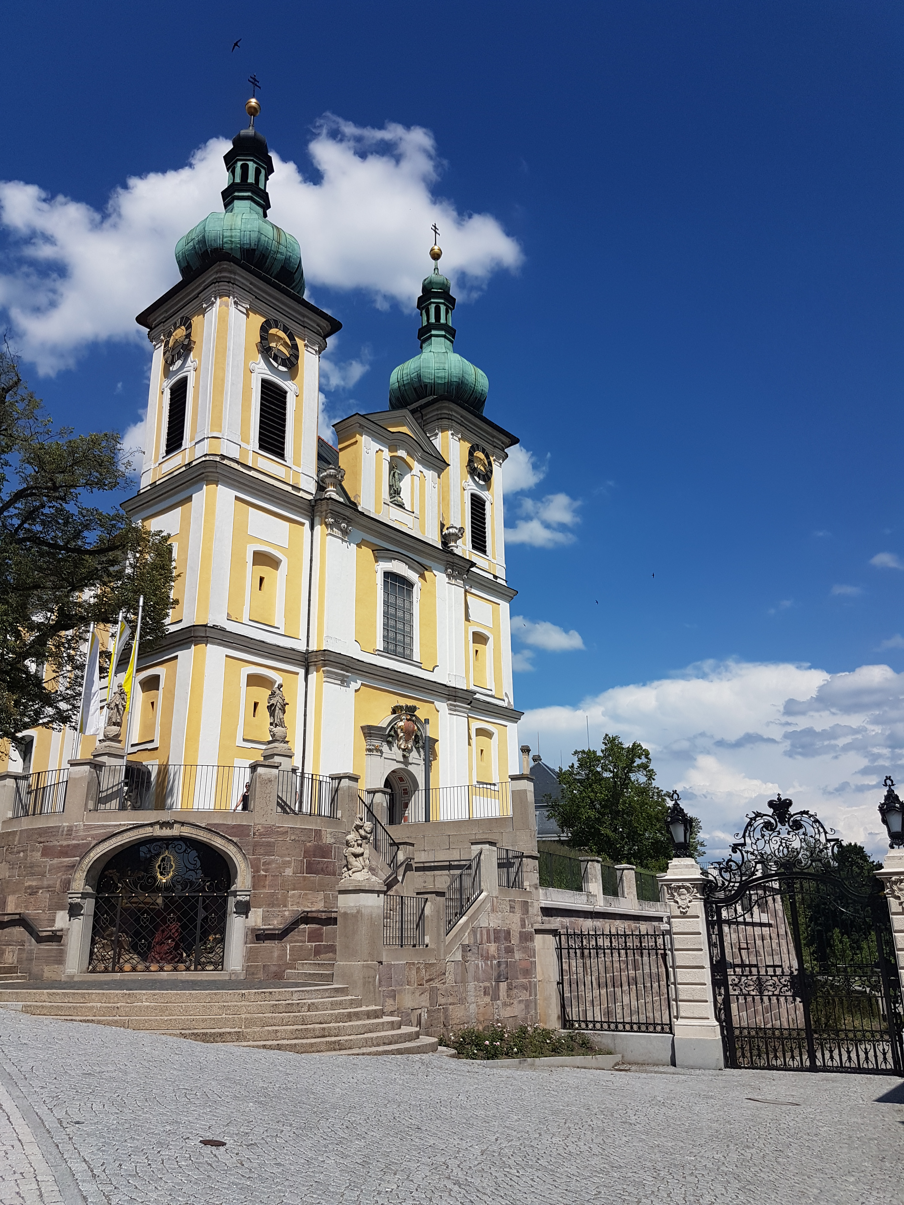 Stadtkirche St. Johann Donaueschingen